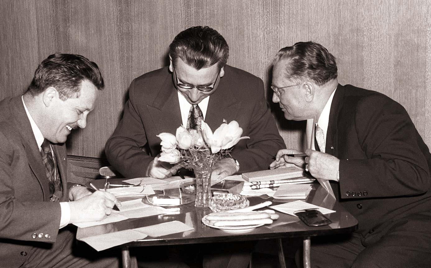 Resolucija VII. kongresa o prihodnjih nalogah ZKJ. Tovariš Tito, Kardelj in Rankovič izpolnjujejo volilne listke.